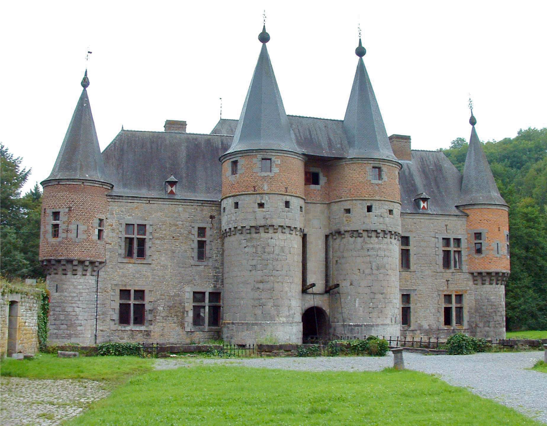 foto genomen op 23/08/2006